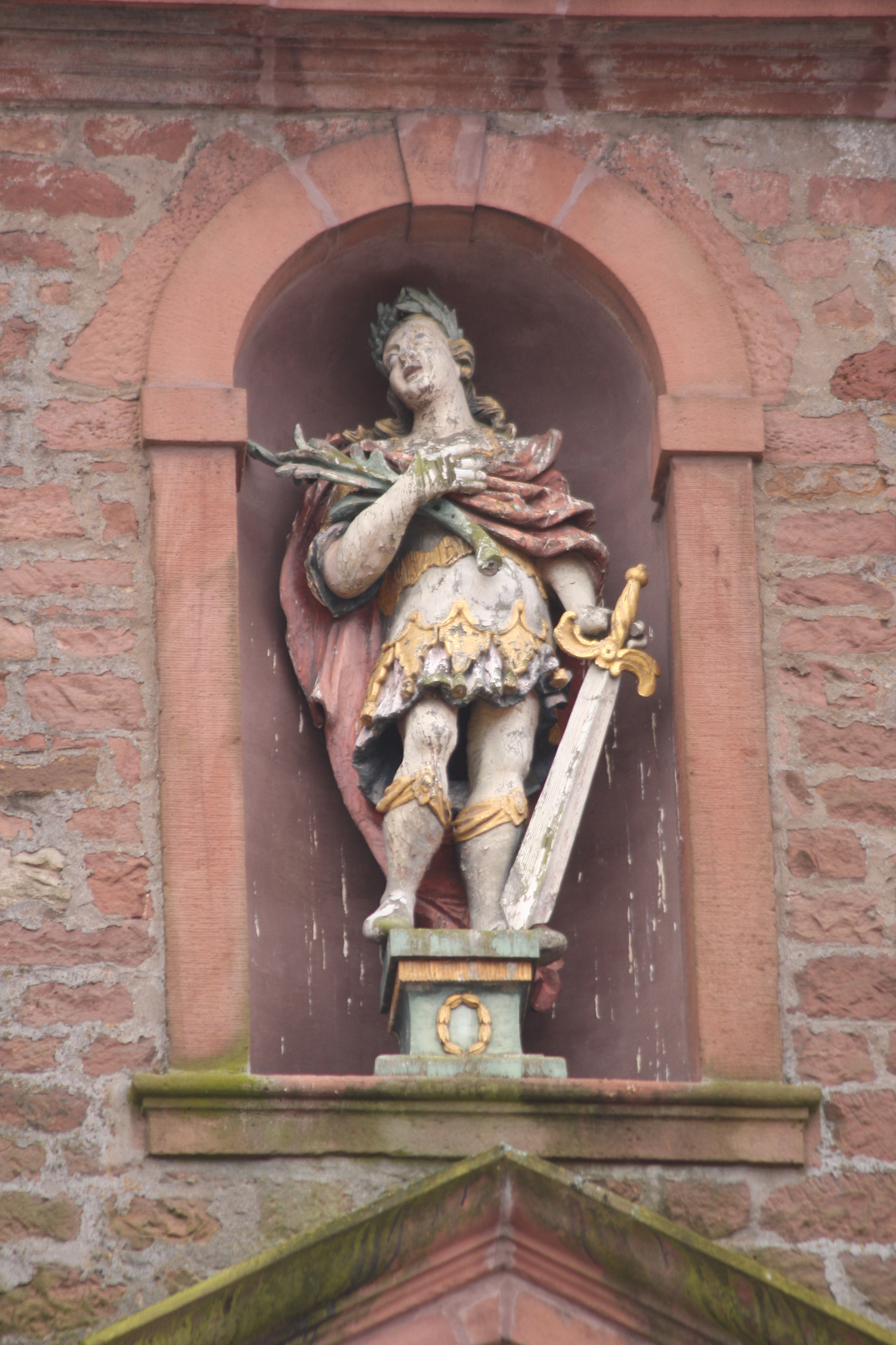 Statue des St. Pankratius, Kirchenpatron Mudau, in einer Nische über dem Hauptportal der Kirche Mudau